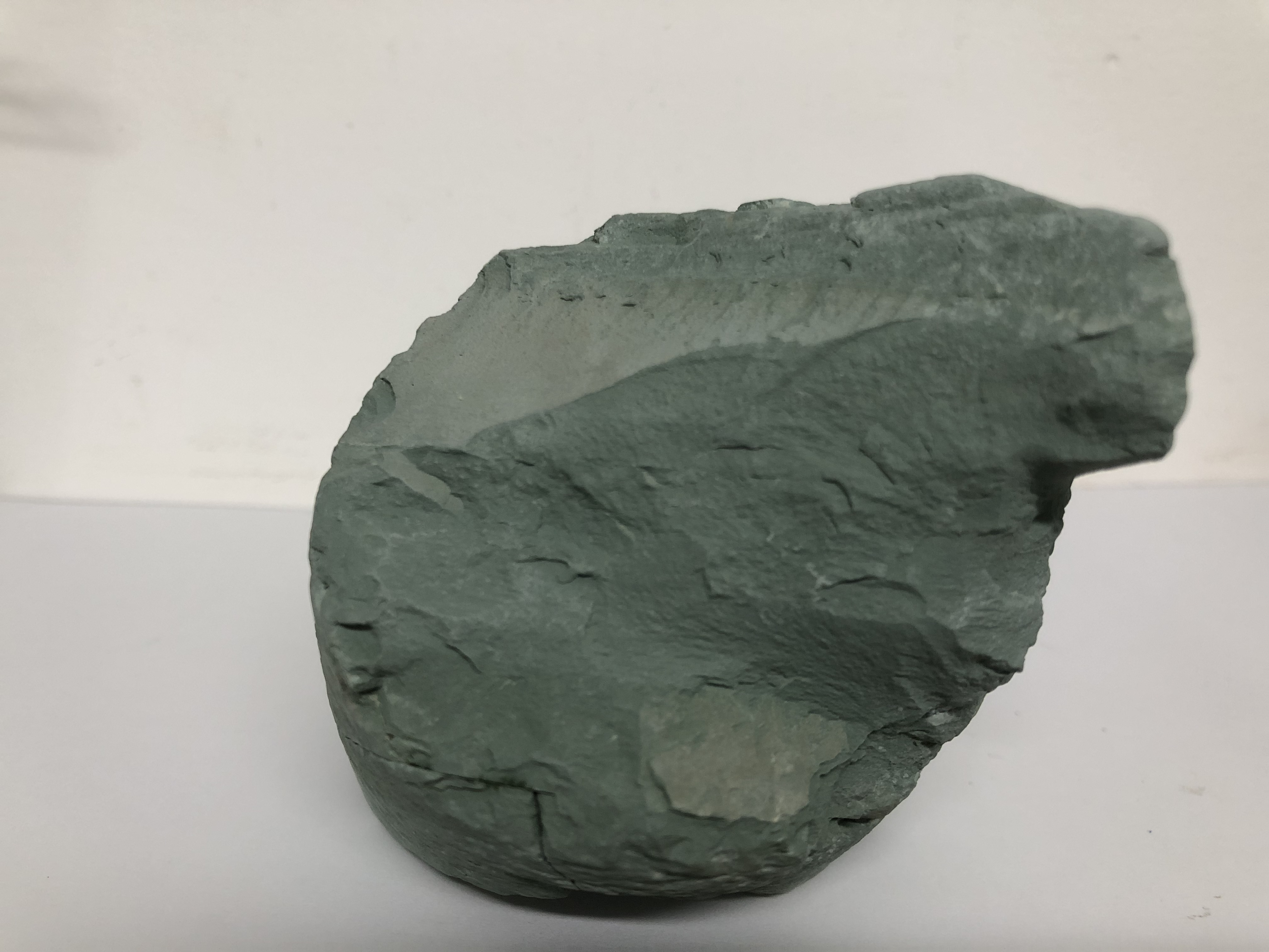 Amostra de Verdete metasiltito